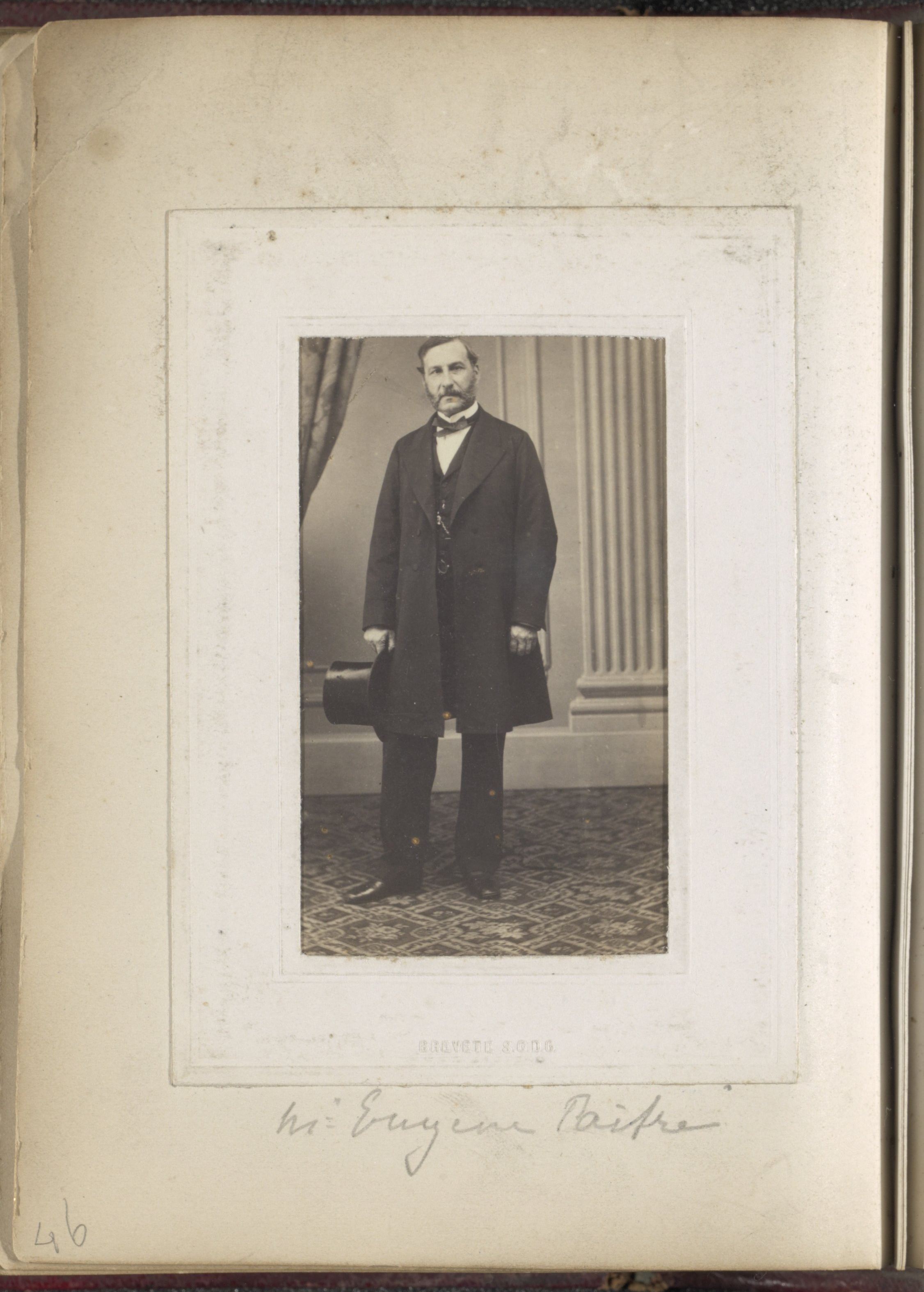 IdentificatieTitel(s): Portret van Eugène PastréObjecttype: foto carte-de-visite Objectnummer: RP-F-1999-158-46Opschriften / Merken: naam, recto, handgeschreven: ‘Eugène Pastré’naam, verso, handgeschreven: ‘Mr. Eugène Pastré’adres, verso: ‘Genova Piazza Aquaverde No. 10’Omschrijving: Onderdeel van Fotoalbum met 48 cartes-de-visite aangeboden aan maarschalk graaf De Castellane.VervaardigingVervaardiger: fotograaf: Gaetano GallinoPlaats vervaardiging: GenuaDatering: ca. 1860 - ca. 1865Fysieke kenmerken: albuminedrukMateriaal: karton papier fotopapier Techniek: albuminedrukAfmetingen: foto: h 95 mm × b 57 mmkarton: h 105 mm × b 62 mmOnderwerpWat: historical personsstudio requisites ~ photographertrousers, breechescoat, capeshoes, sandalsneck-gear ~ clothinghairdresshead-gear: top hatclothing for the upper part of the bodymoustacheWaar: GenuaWie: Eugène PastréVerwerving en rechtenVerwerving: aankoop 1999Copyright: Publiek domein